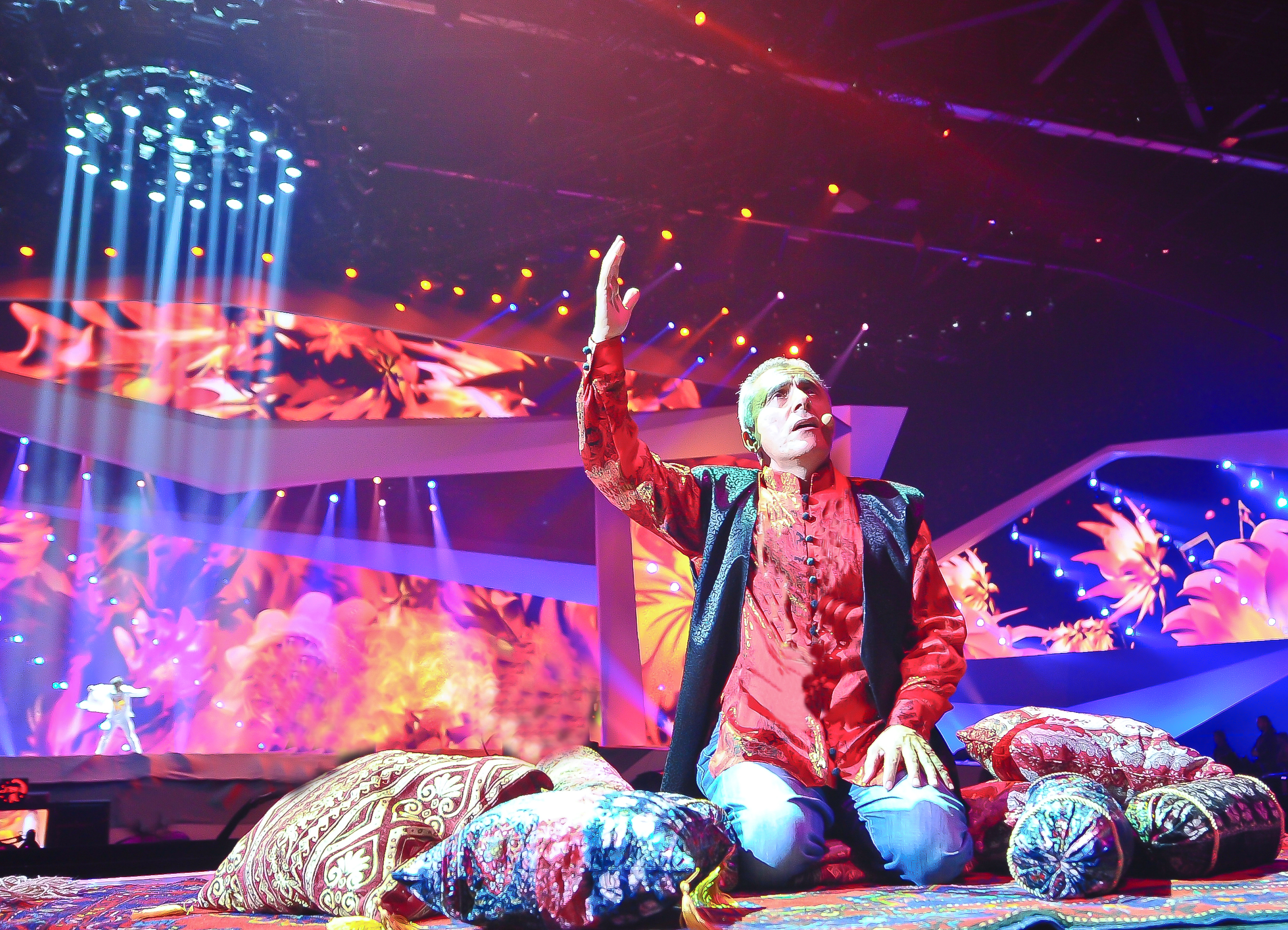 Алим Гасымов Baku Crystal Hall